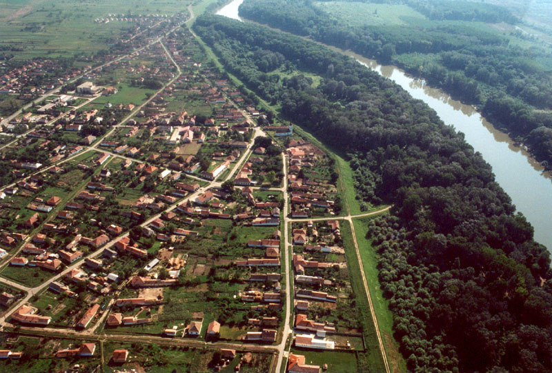 Tiszabura levegőből